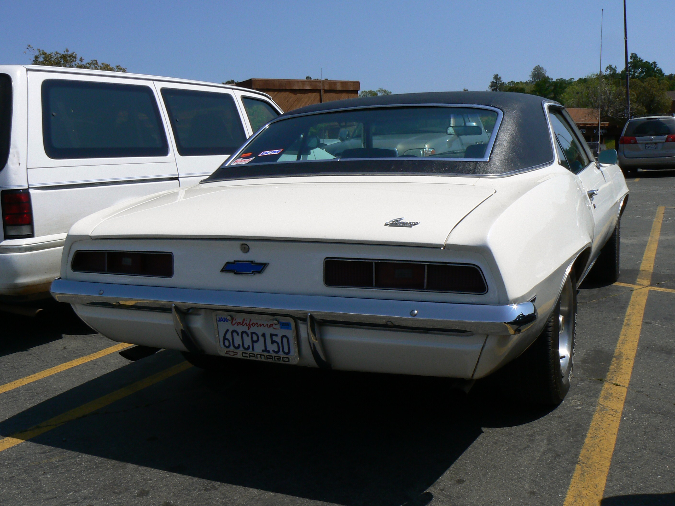 1969 Camaro